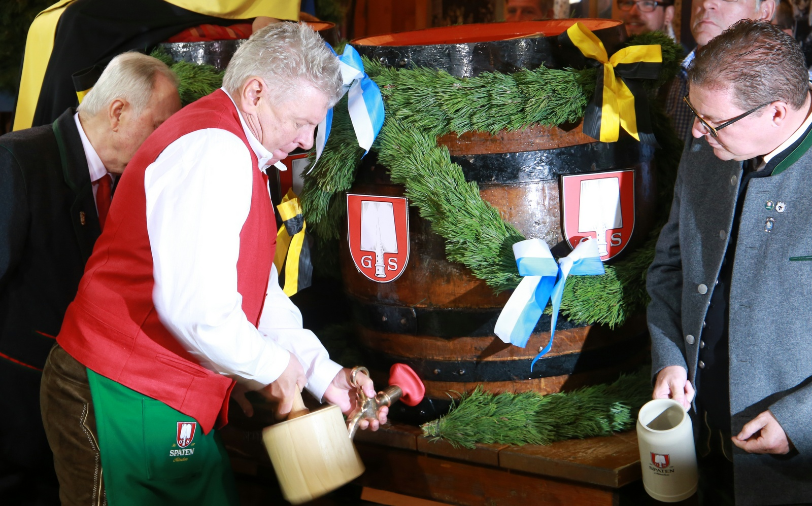 Der Münchner Oberbürgermeister Dieter Reiter zapft am 16.09.2017 auf der Wiesn um genau 12 Uhr das erste Fass Bier. Titel des Werks: "Münchens OB Dieter Reiter (2017)"